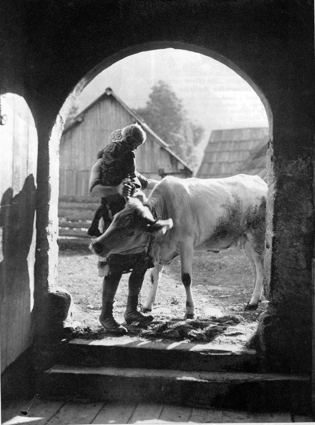 Motiv iz Jezerskega.